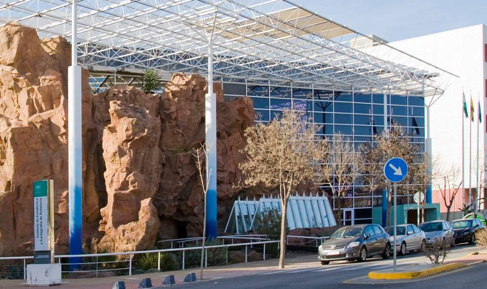 Sede del Instituto de Estadística y Cartografía de Andalucía. Pabellón de Nueva Zelanda en Isla de la Cartuja